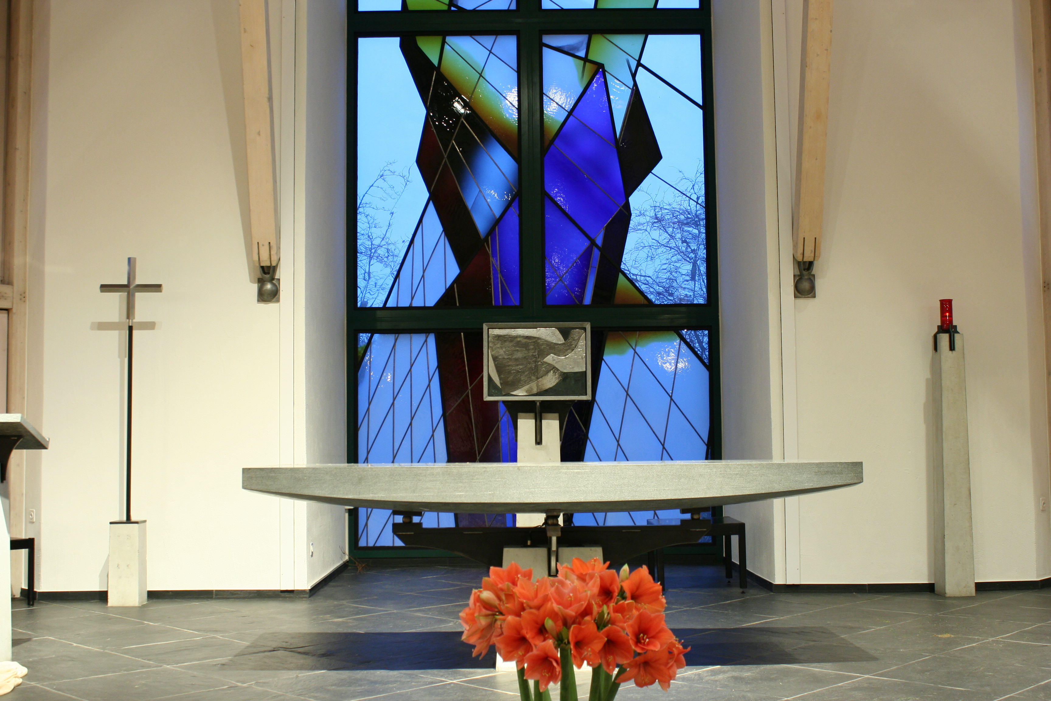 Römisch-katholische Kirche St. Katharina von Siena Fällanden, Altar